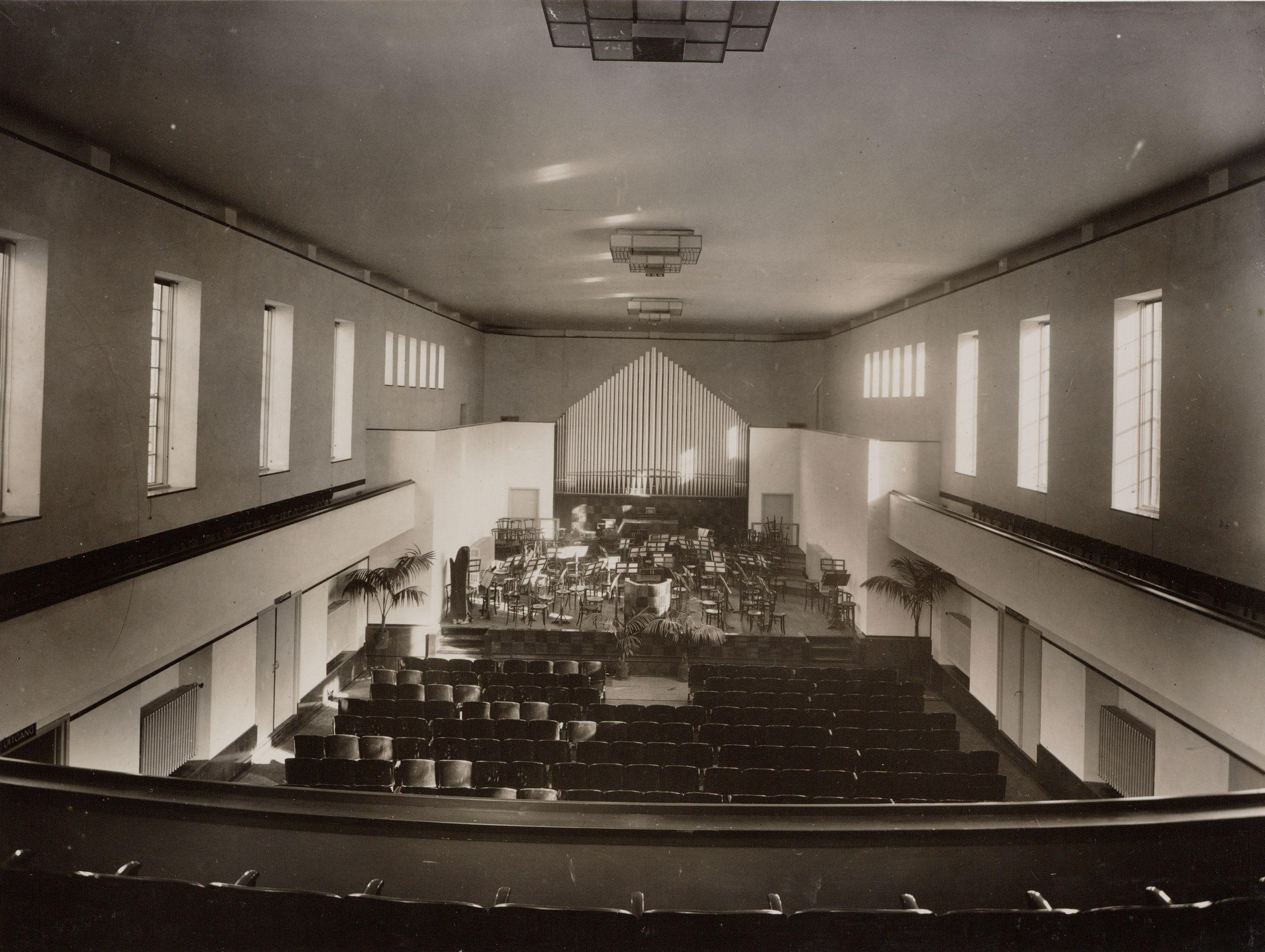 De Bachzaal is een middelgrote concertzaal in Amsterdam. De zaal dankt zijn naam aan de Bachstraat waar de zaal is gevestigd. Piet Vorkink (1878-1960) heeft het ingenieuze complex in 1930 ontworpen. A'dams cons interieur 1931, Bachzaal.